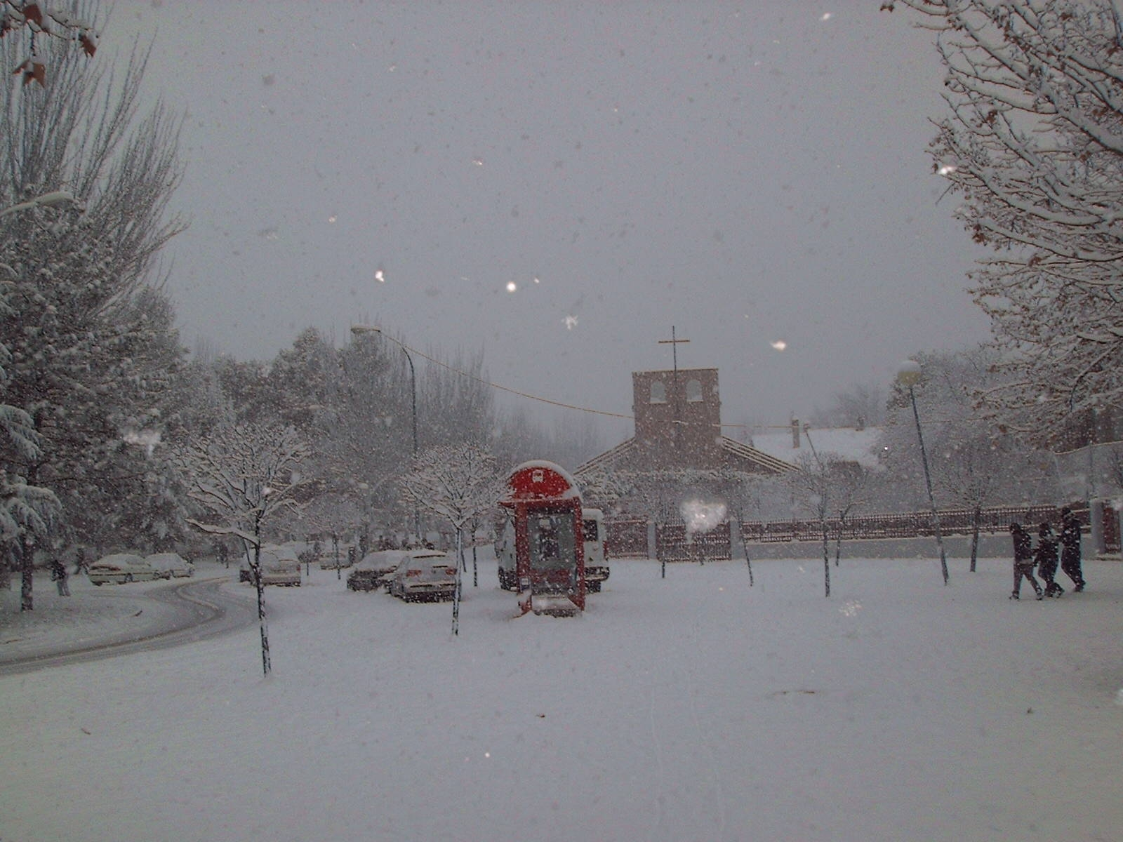 El 9 de enero de 2009 el centro de la península española se vio sorprendida por una ola de frío Siberiano que desencadenó una copiosa nevada sobre la ciudad de Madrid y su área metropolitana en cotas a partir de los 400 m. Al estar la capital española entre los 600 y 700 metros, la nieve acumulada en las zonas urbanas llego hasta los 30 cm. en las zonas al este de la capital, especialmente en el Corredor del Henares, dónde se sitúa San Fernando de Henares.